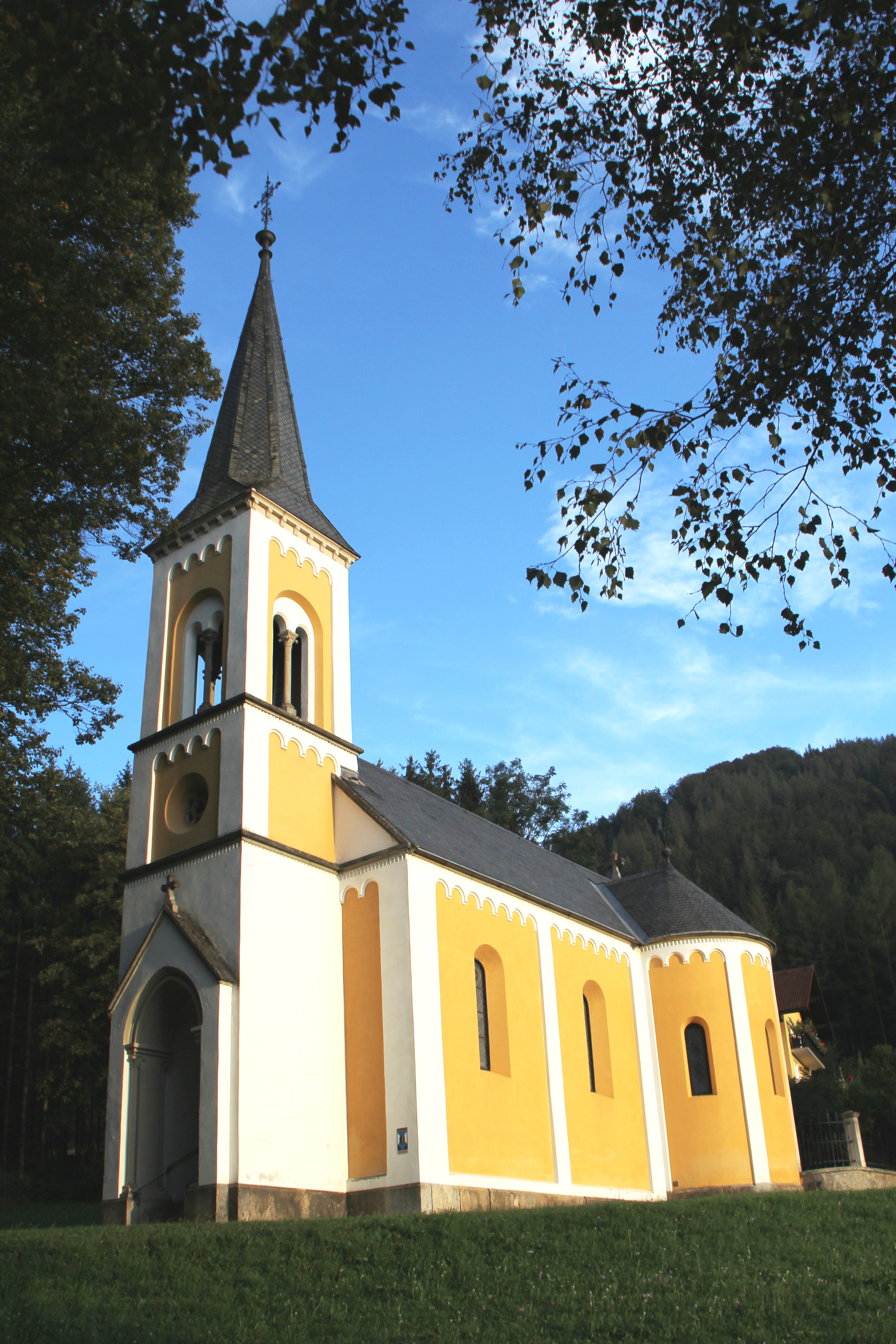 Gölk-Kapelle (Schmerzhafte Mutter am Gölkberg), Messkapelle: Die Kapelle am Fuße des Gölkberges wurde 1805 als Holzkapelle errichtet, 1870 wurde sie neu aufgebaut. Nach dem Tot seiner Gemahlin ließ Viktor Freiherr von Seßler-Herzinger die Andachtsstätte umbauen und die Familiengruft darunter setzen.